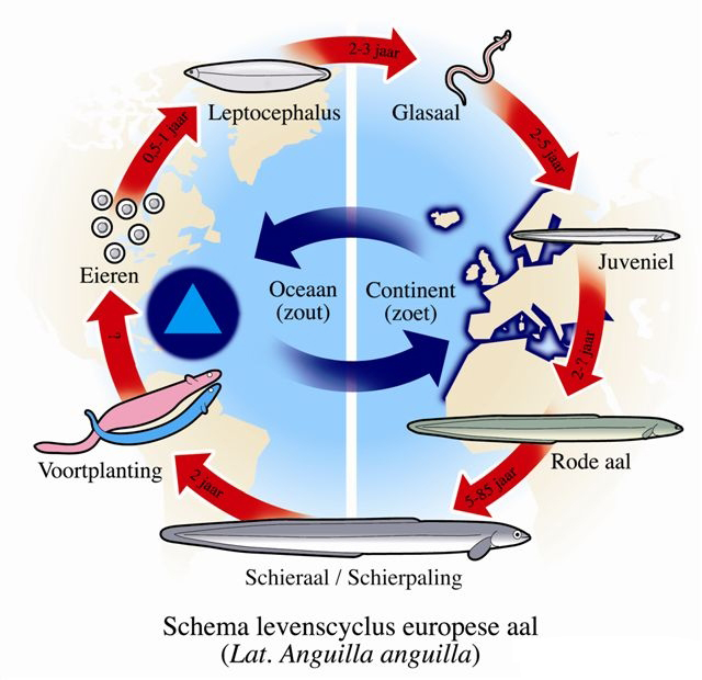 Afbeelding Palingscyclus